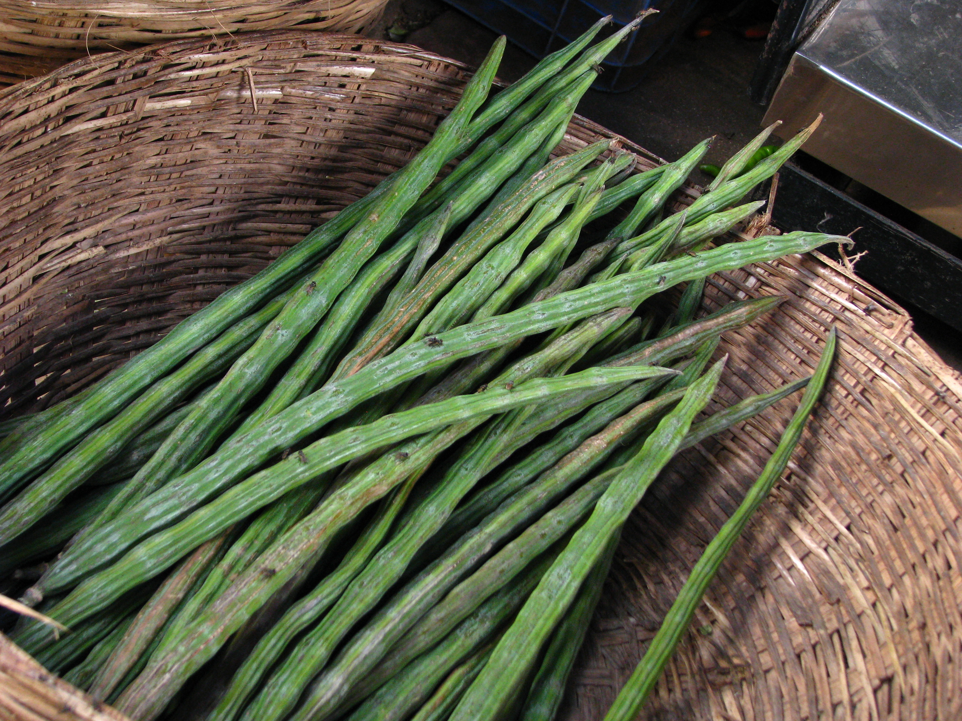 India - Koyambedu Market - Drumstick 06